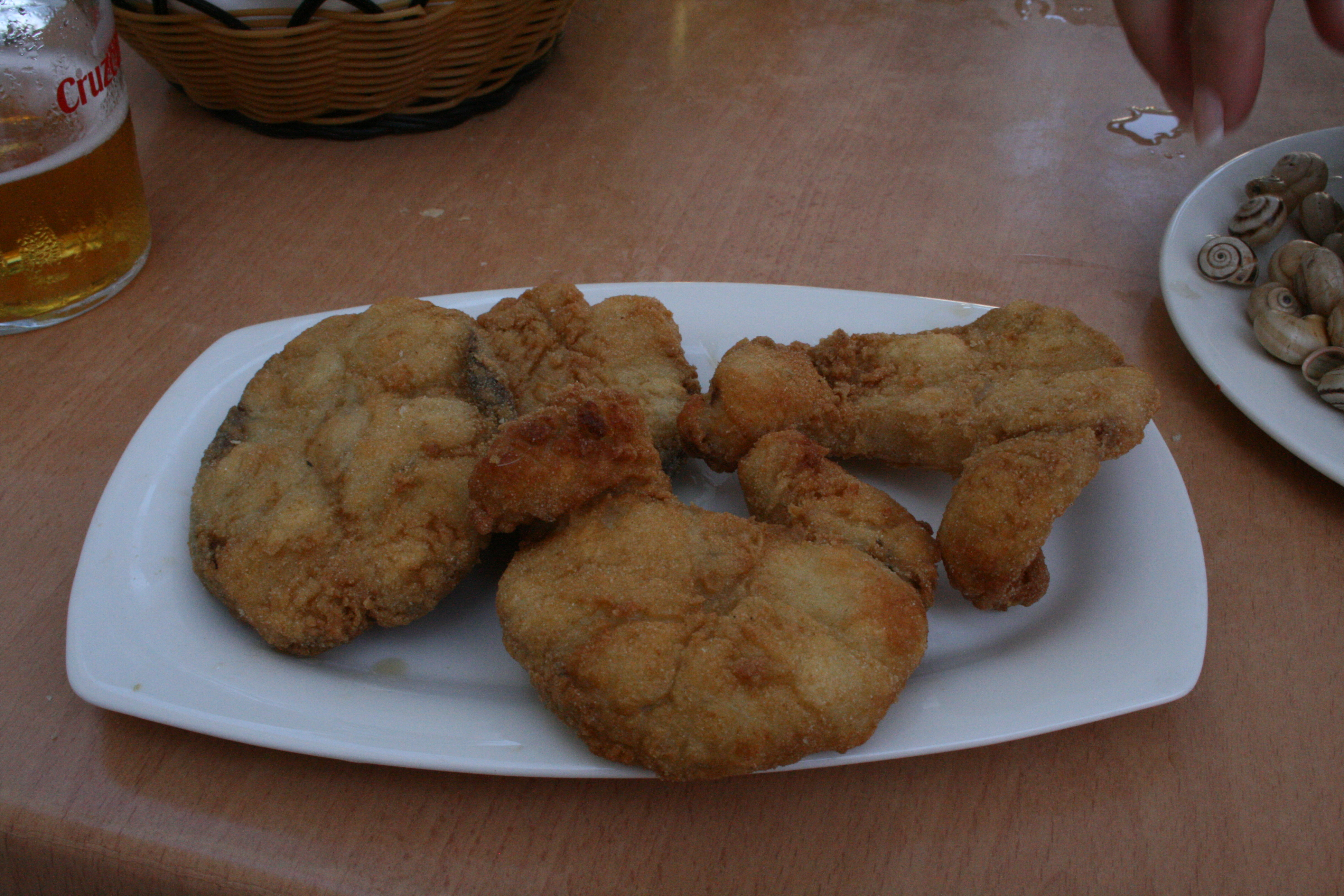 Cazón en adobo - Cádiz